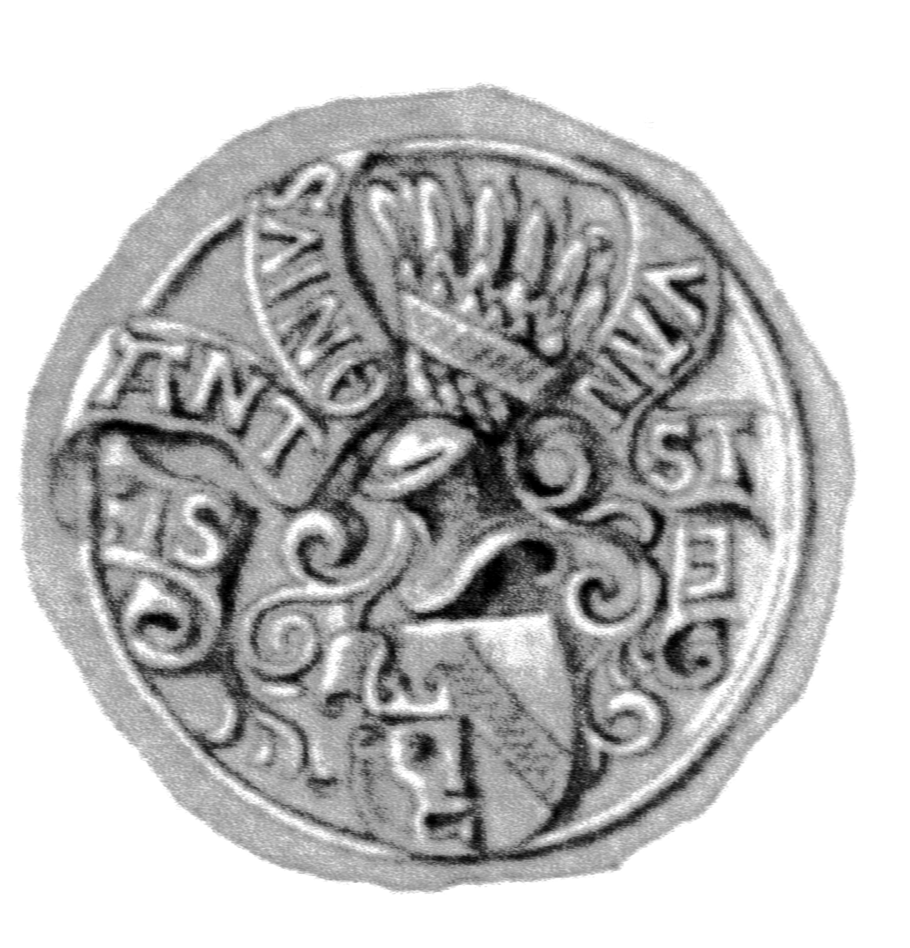 Siegel des Ratsmannes Anton von Stiten. Das Siegel stammt aus der Zeit um 1551. Siehe Emil Ferdinand Fehling: Lübeckische Ratslinie, Nr. 620 (Anton von Stiten)